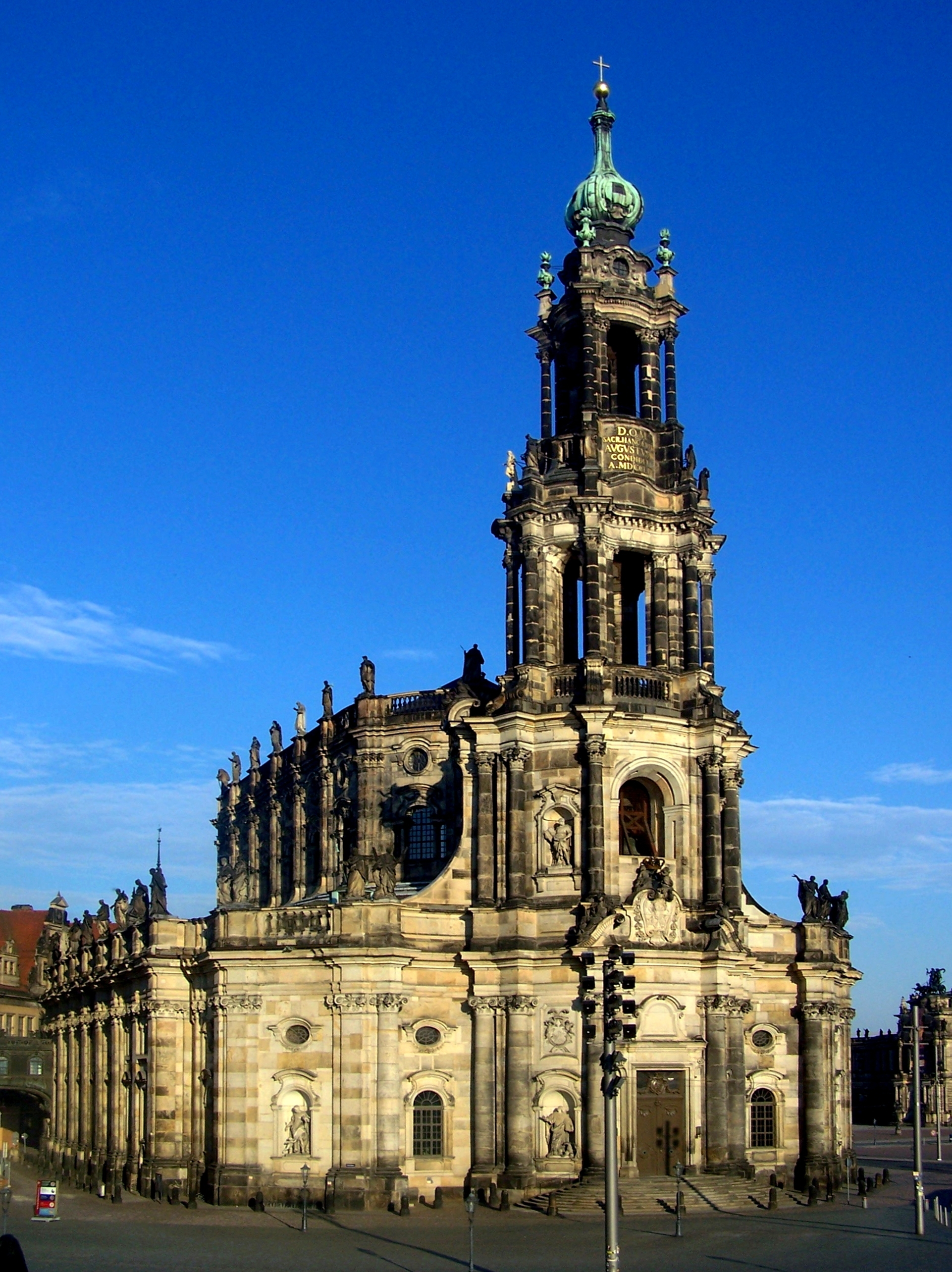 Dresdner Hofkirche von der Brühlschen Terrasse aus